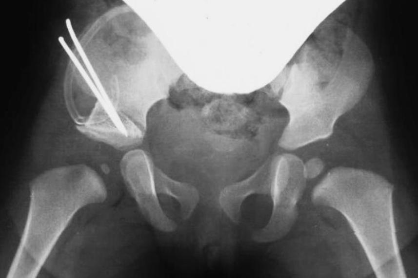 zustand nach Acetabuloplastik (Pemberton) rechts.